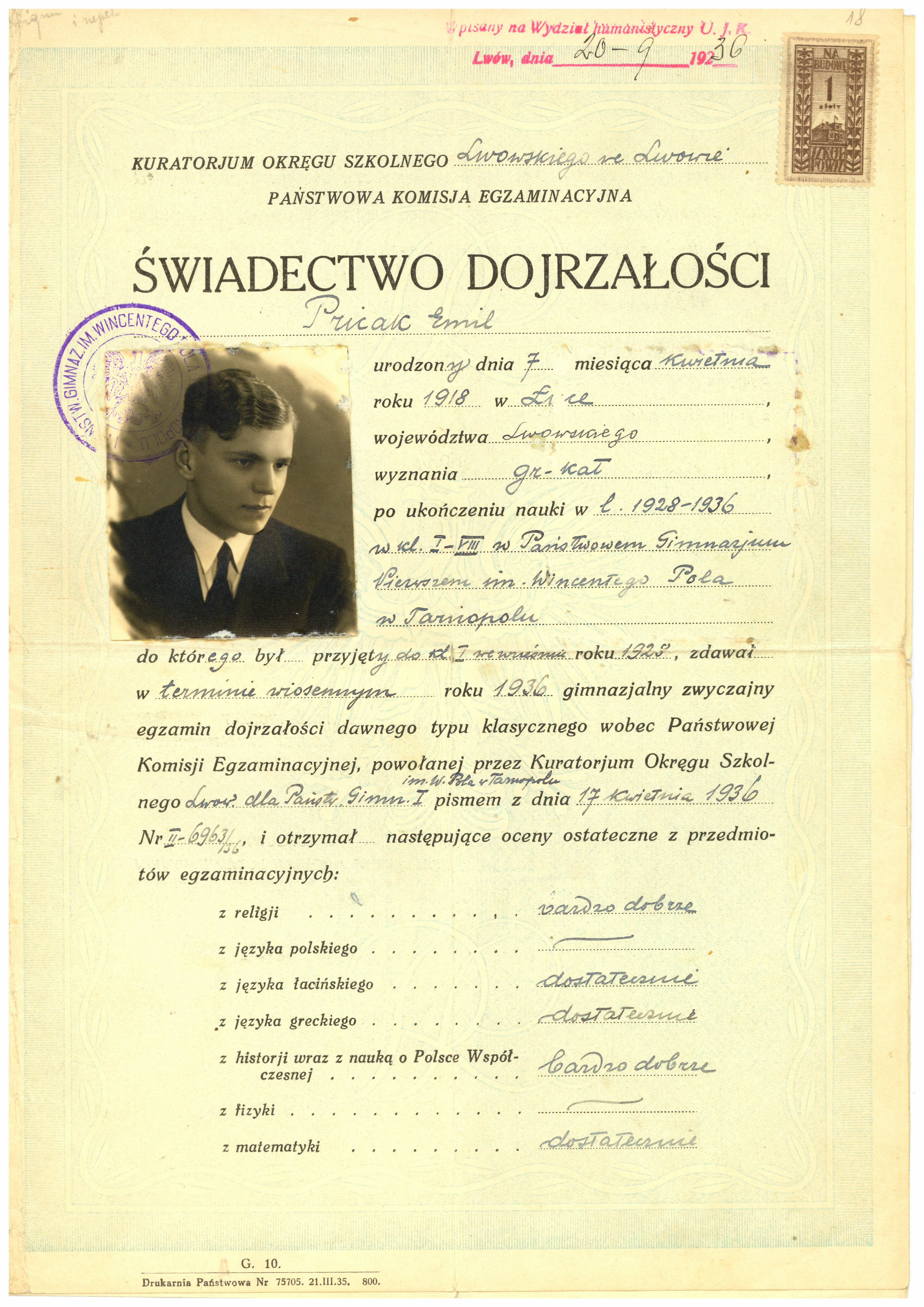 Гімназійне свідоцтво зрілости Омеляна Пріцака, 1936 рік